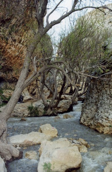 Sepidan Avril 2006